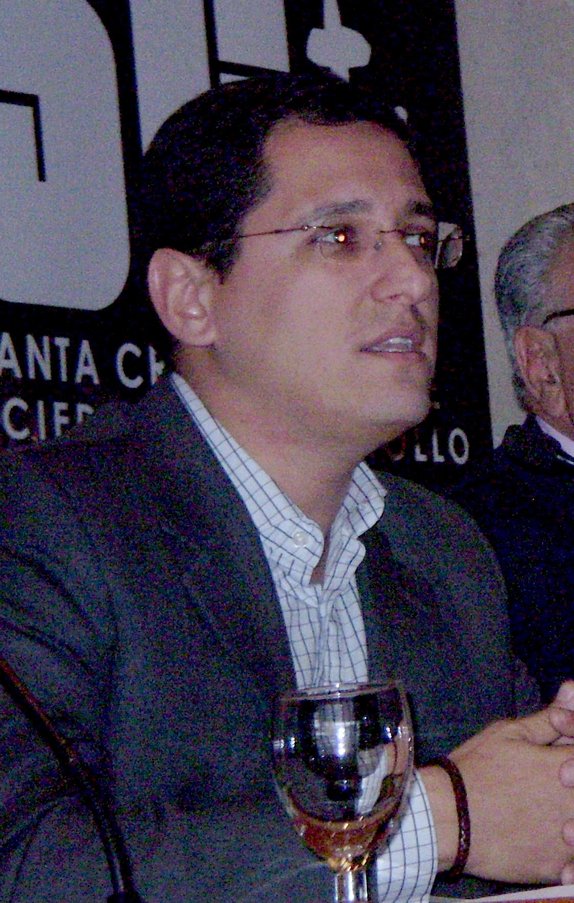 Ángel Llanos